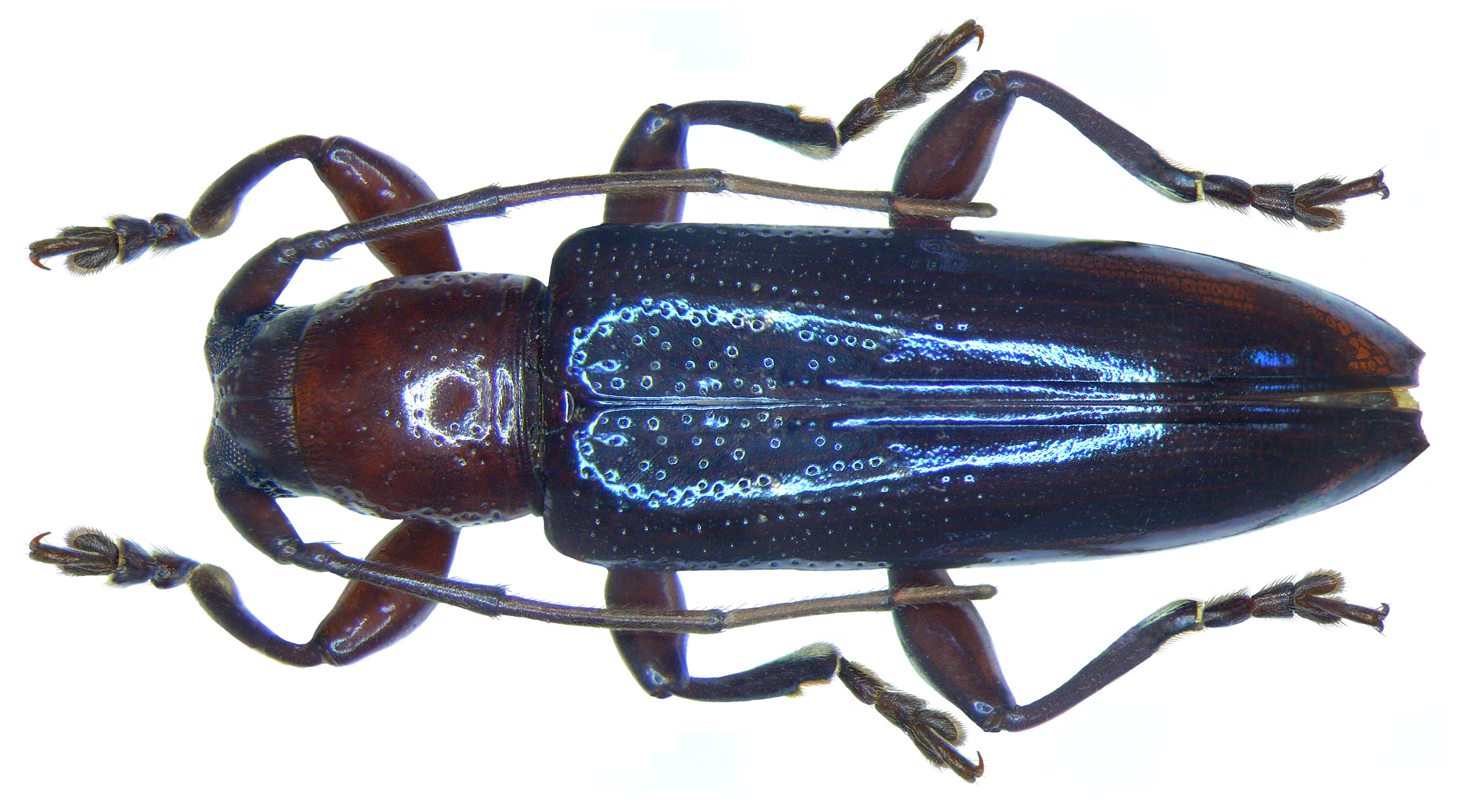 Familie: Cerambycidae Grösse: 11 mm Fundort: Papua Neuguinea, Sepik leg. L.Schultze, 1910; det. Breuning, 1959 Holotypus, Coll. Museum Berlin Foto: U.Schmidt, 2008